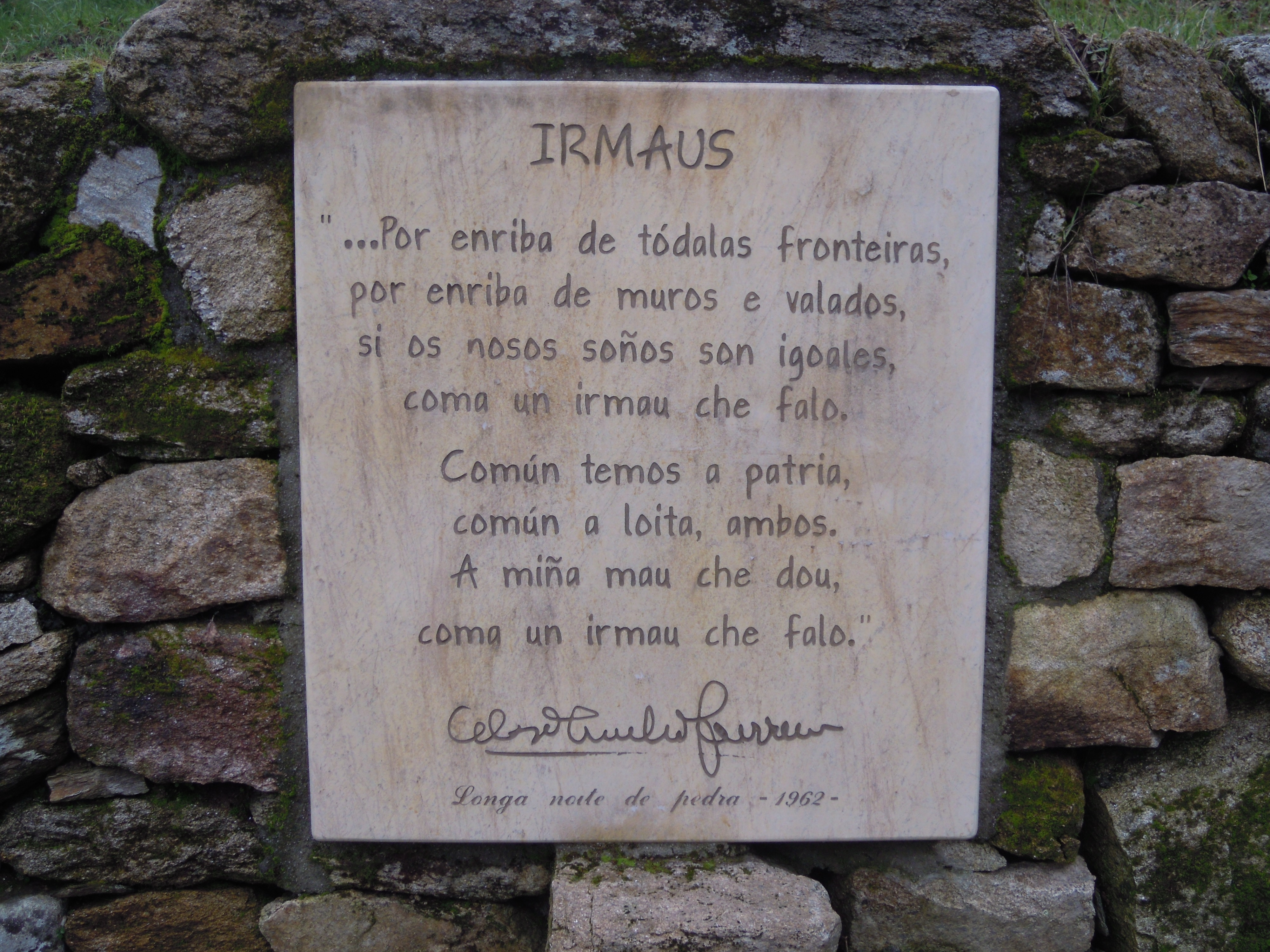 Texto de Celso Emilio Ferreiro na Insua dos Poetas